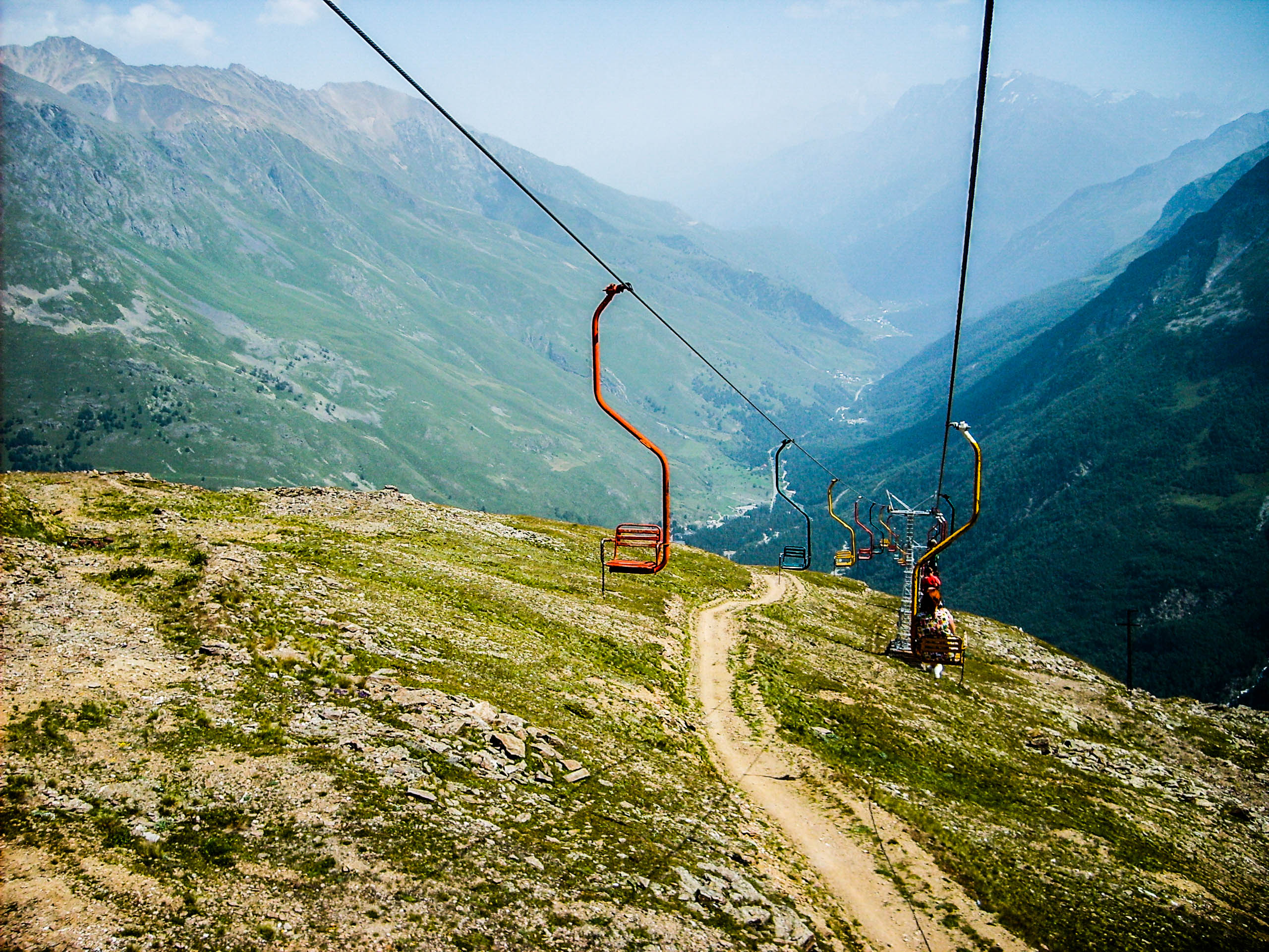 Приэльбрусье, Зольский район This image is related to the protected area of Russia number 0700010